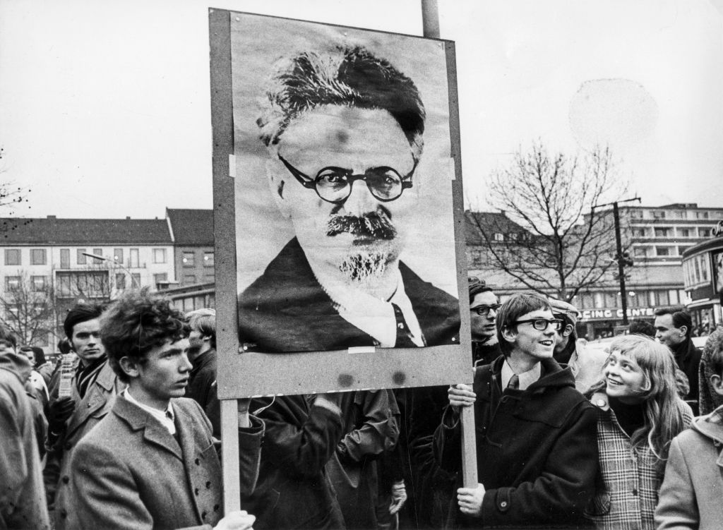 2001_03_0275.4212 Ludwig Binder: Studentenrevolte 1967/68, West-Berlin; veröffentlicht vom Haus der Geschichte der Bundesrepublik Deutschland Rechts: Peter Brandt und Freundin Maria beim Protestmarsch gegen die polnische Militärmission, 13.03.1968? [1]